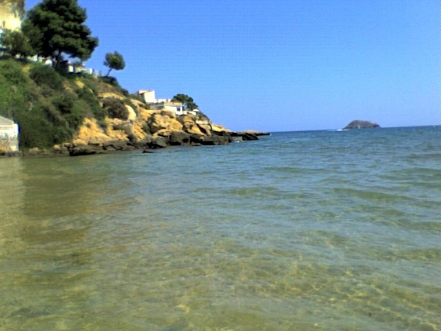 Pulpí (Almería, España)